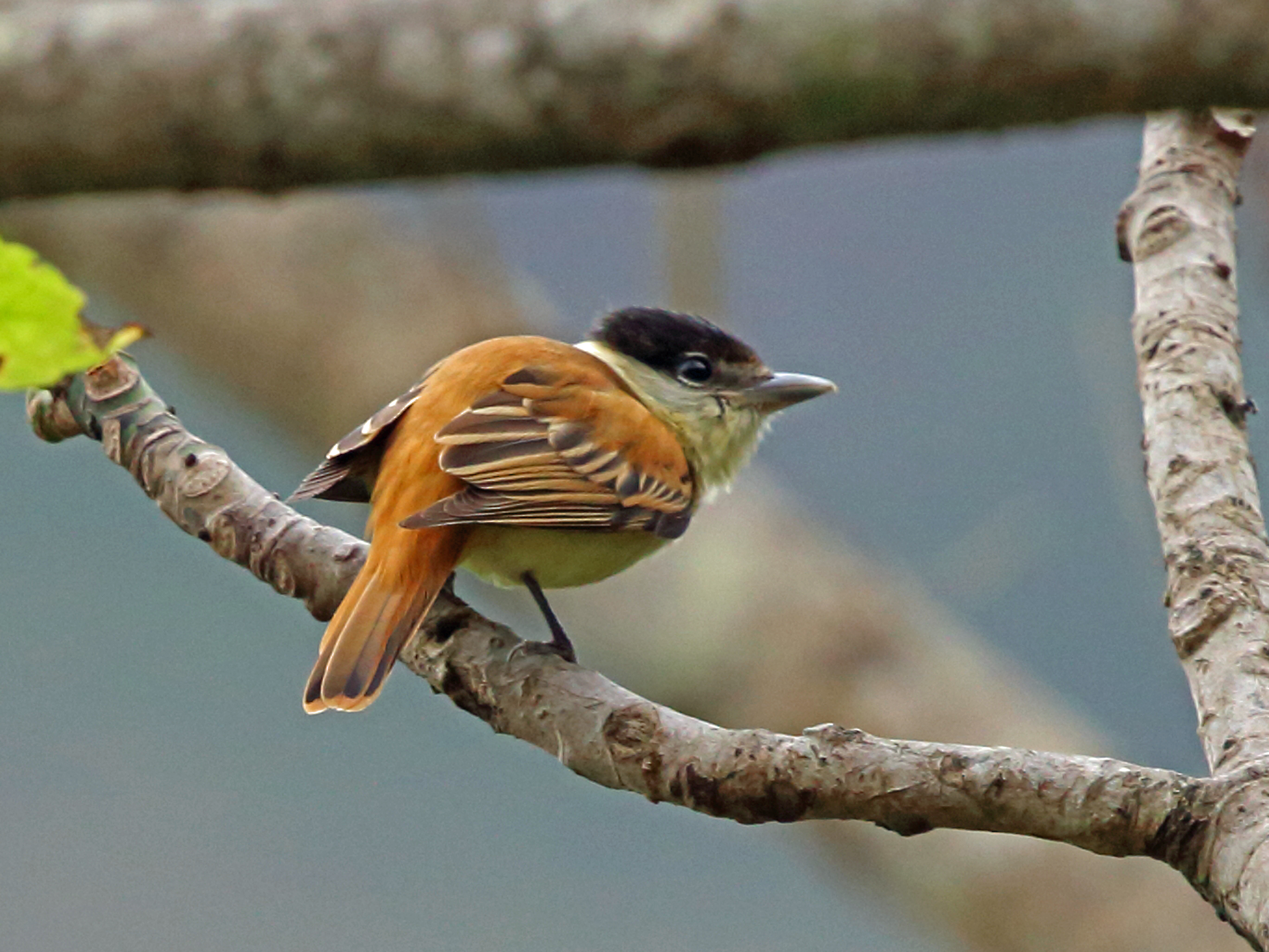 Grey-collared Becard, La Concordia, Mexico